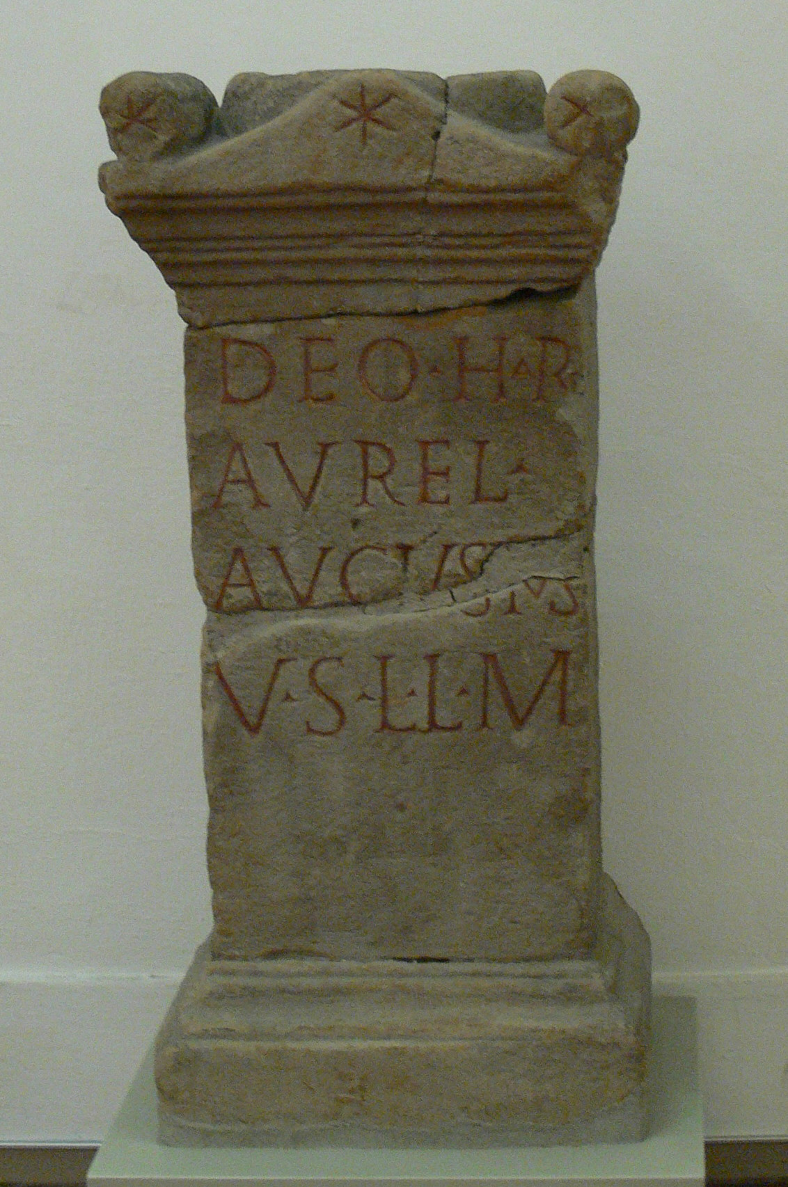 Vorarlberger Landesmuseum, Bregenz Römische Inschrift aus Brigantium (IBR 00074a )